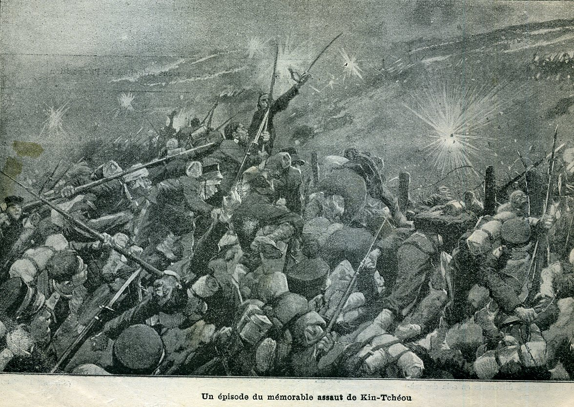 see picture